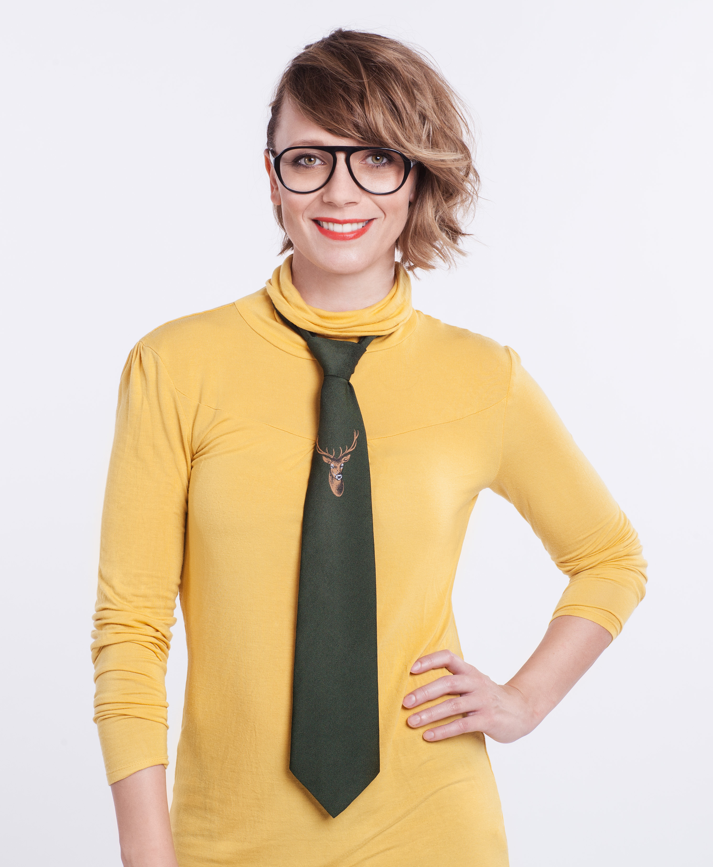 Wohnexpertin Melanie Frehse